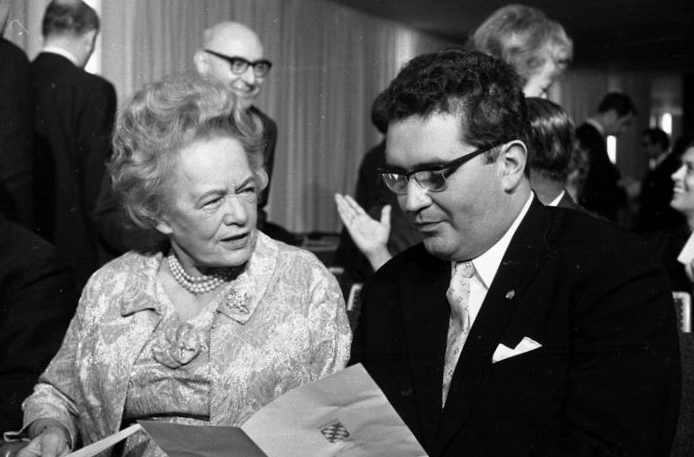 Bundespräsident Lübke u. Mitglieder des Dipl. Corps in der Landesvertretung Bayern